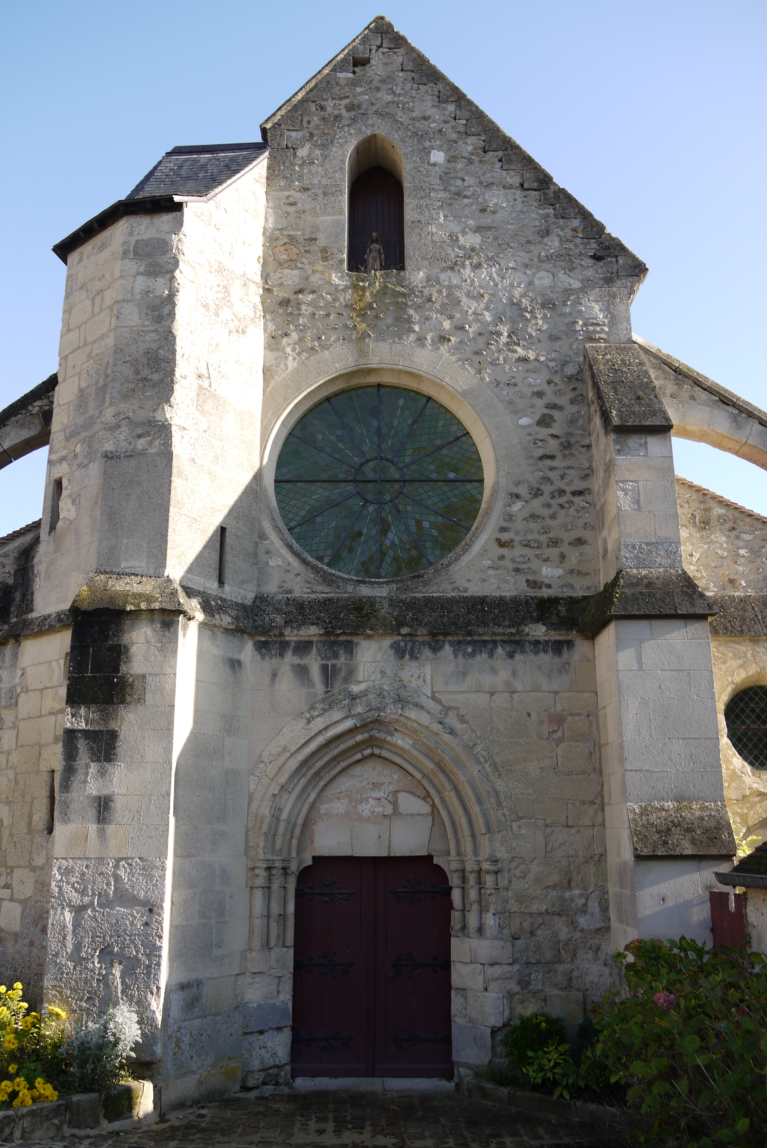 Église Saint-Éloi de Barzy-sur-Marne